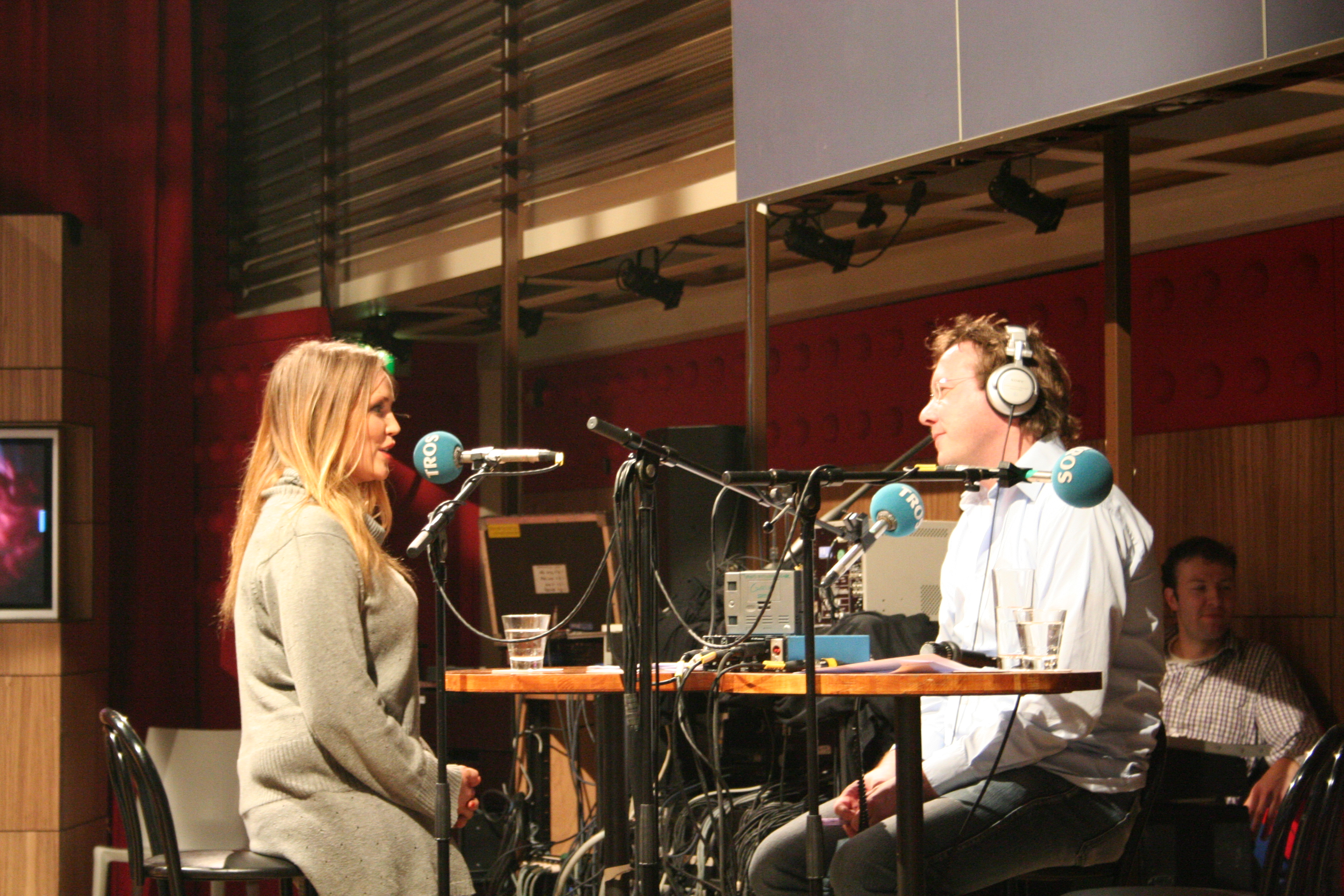 Elvira Nikolaisen at Tros Musiccafe